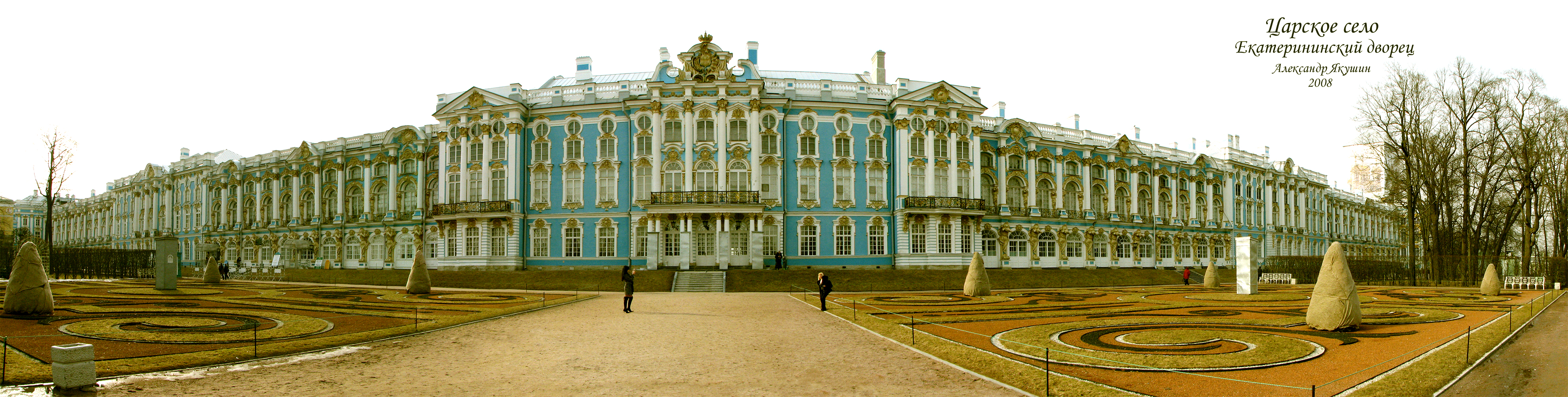 ЦарскоеСело. Ектерининский дворец. Весна 2008г.